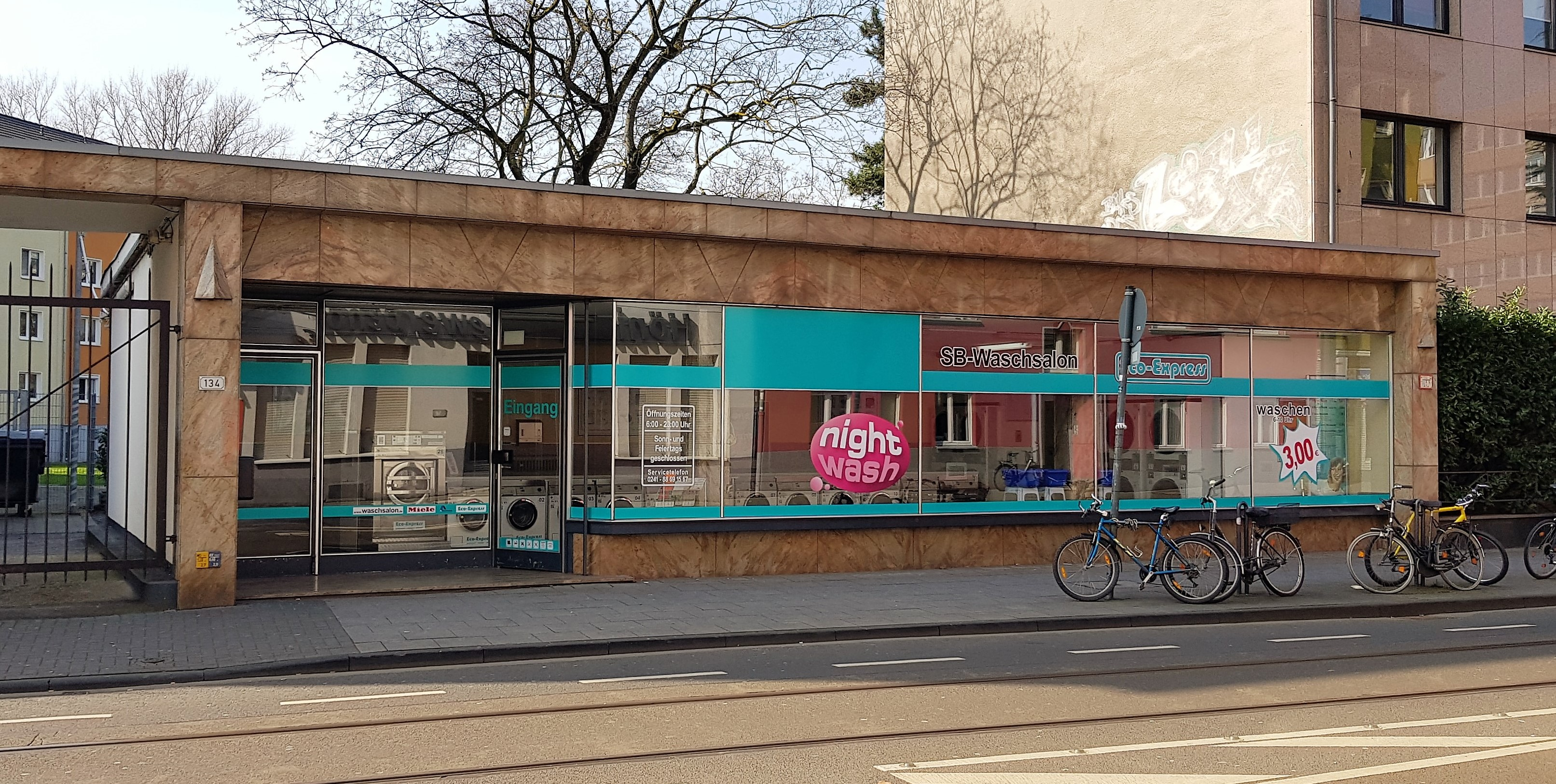 Waschsalon im Kölner Stadtteil Zollstock, in dem seit 2009 die Comedysendung Nightwash gedreht wird.